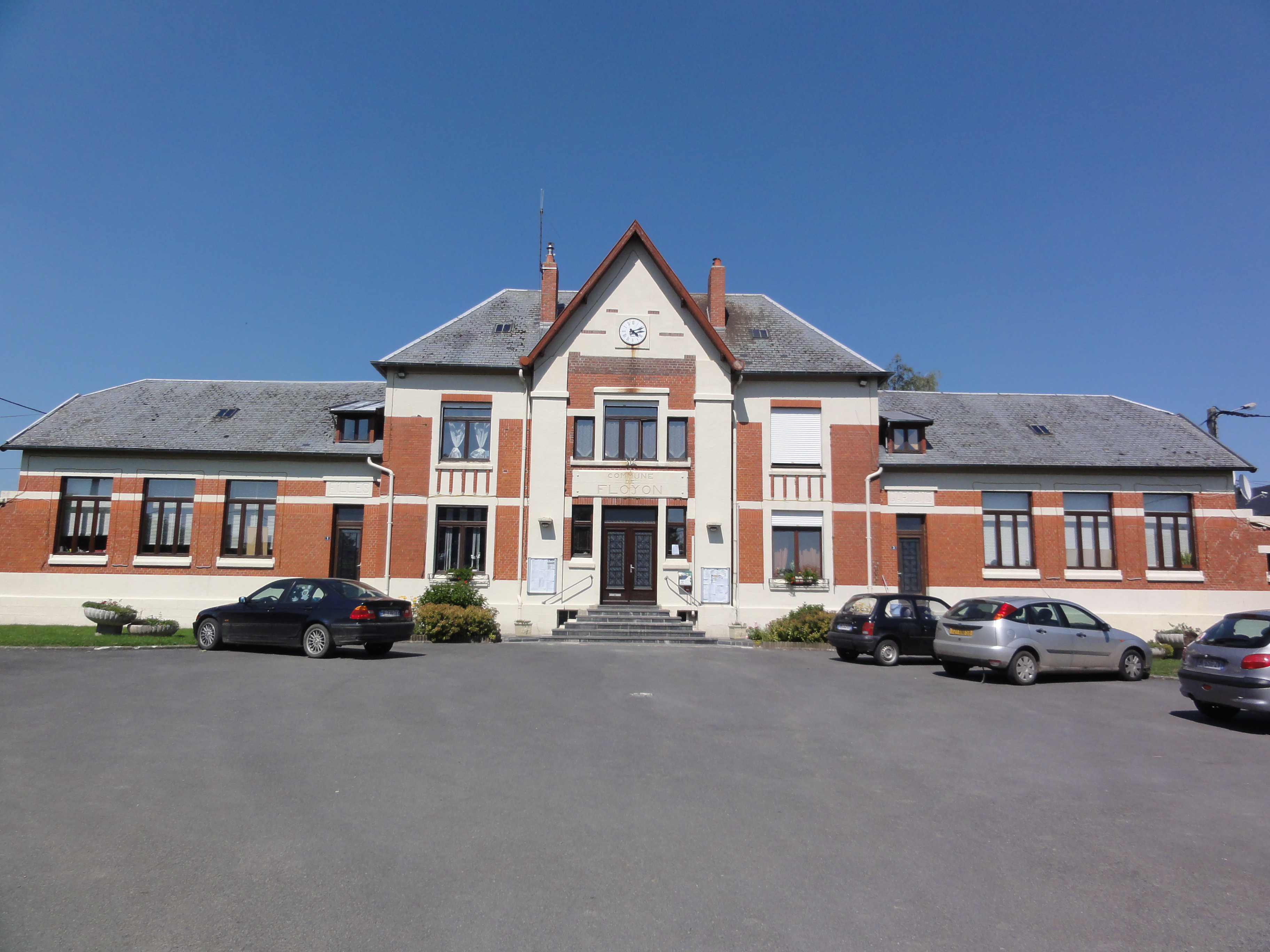 Floyon (Nord, Fr) mairie